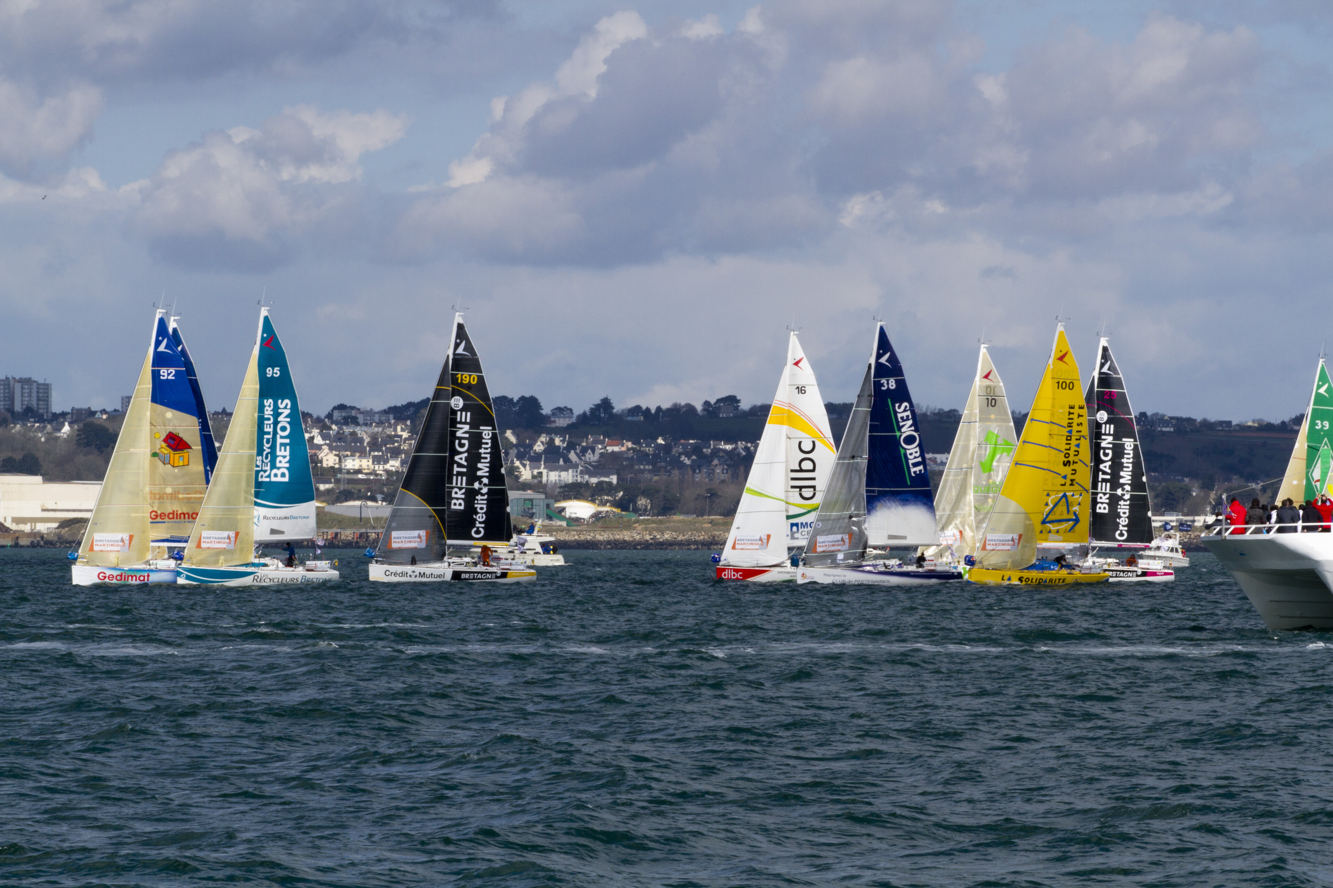 transat_brest_martinique